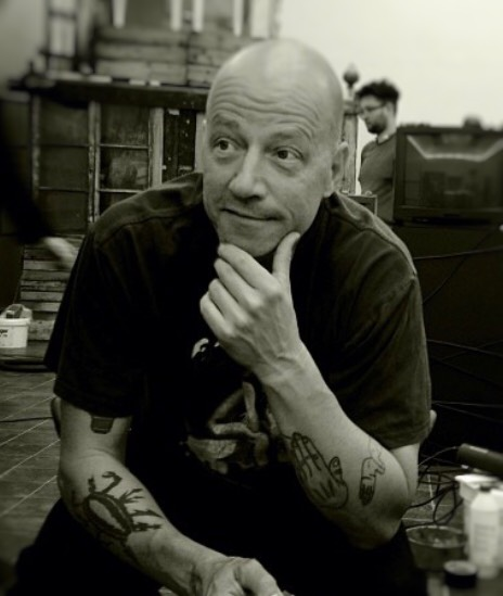 Konstnären Ola Åstrand under hängningen av Love Explosion i juni 2013 på Göteborgs Konsthall. Åstrand var en av två curatorer till denna samlingsutställning med konstnärer verksamma i Göteborg.